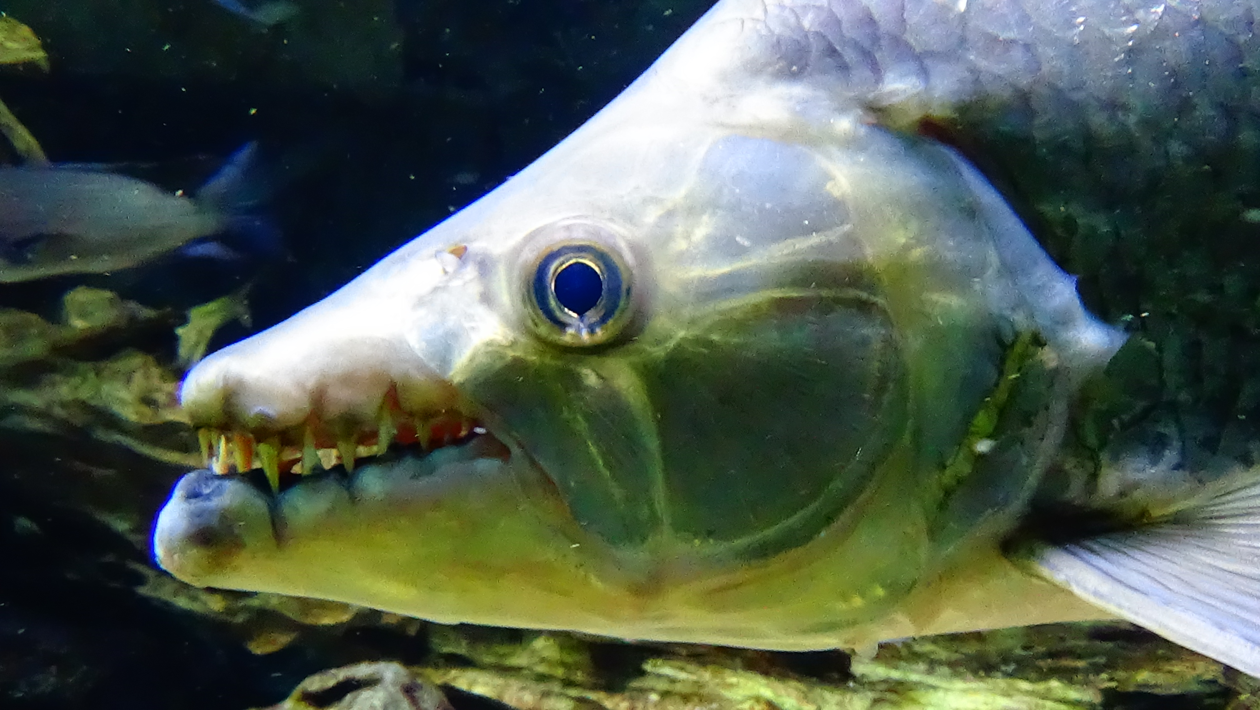 Hydrocynus goliath - Poisson-chien - Aquarium tropical du Palais de la porte Dorée, Paris, ile de France, France - 12/2014